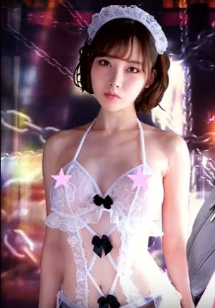 新宿スカウトバトル・プロモーションより切抜き